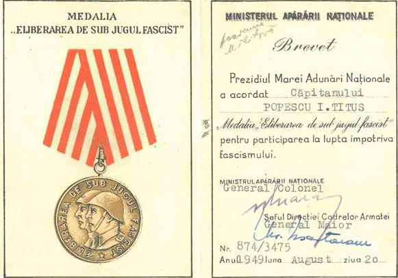 brevet